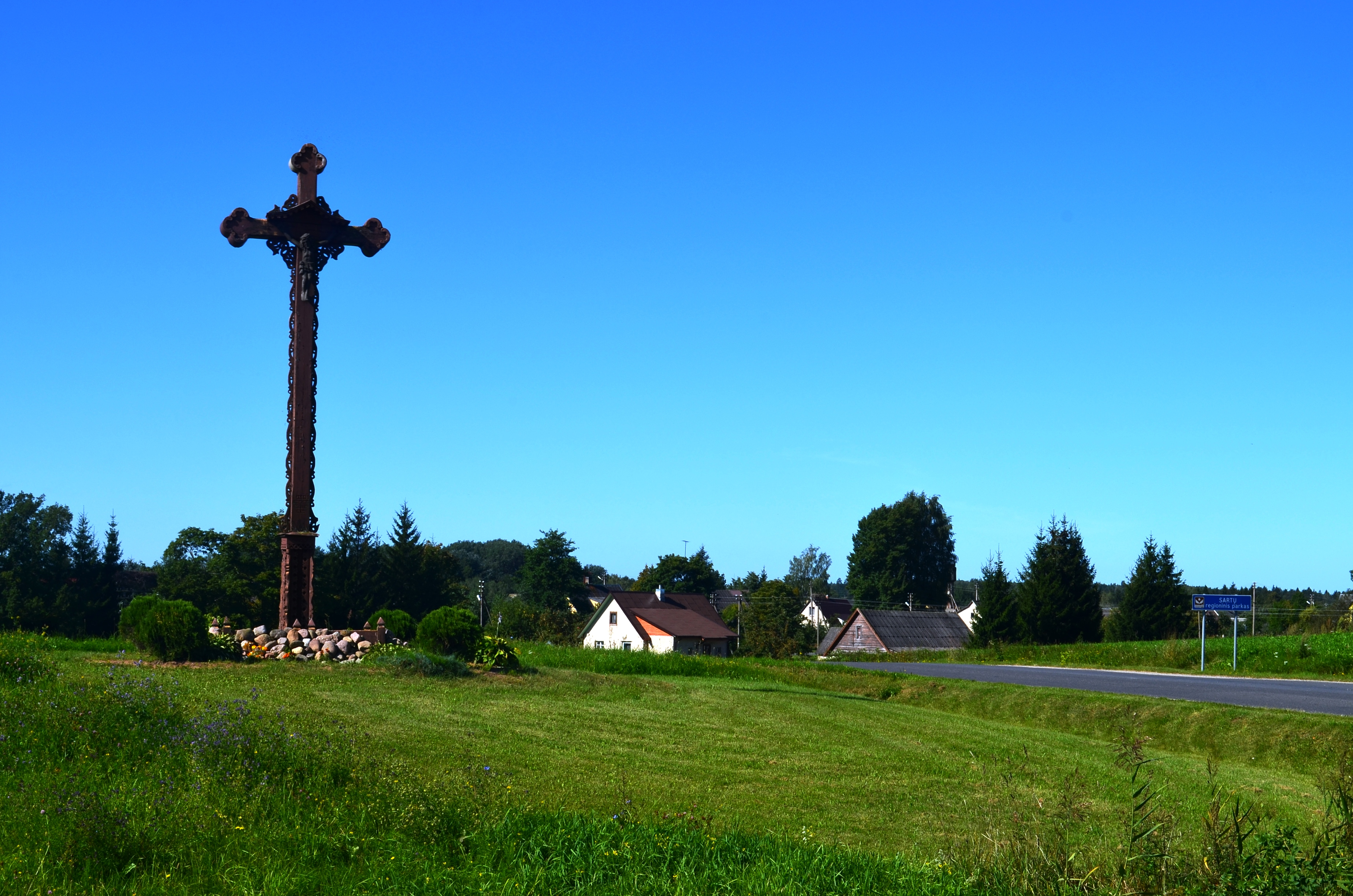 Antazavė, kryžius prie įvažiavimo